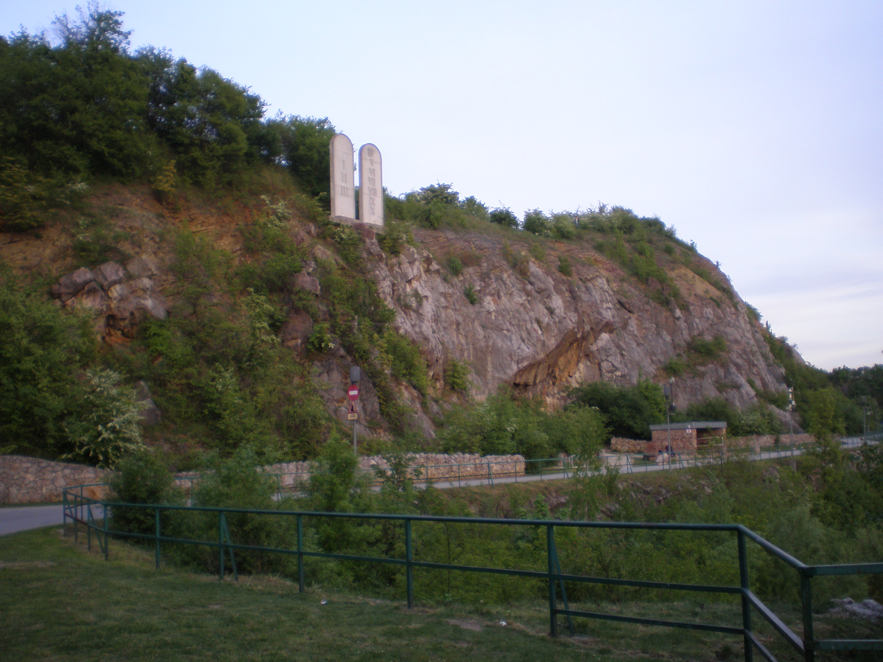 Rezerwat Przyrody Kadzielnia